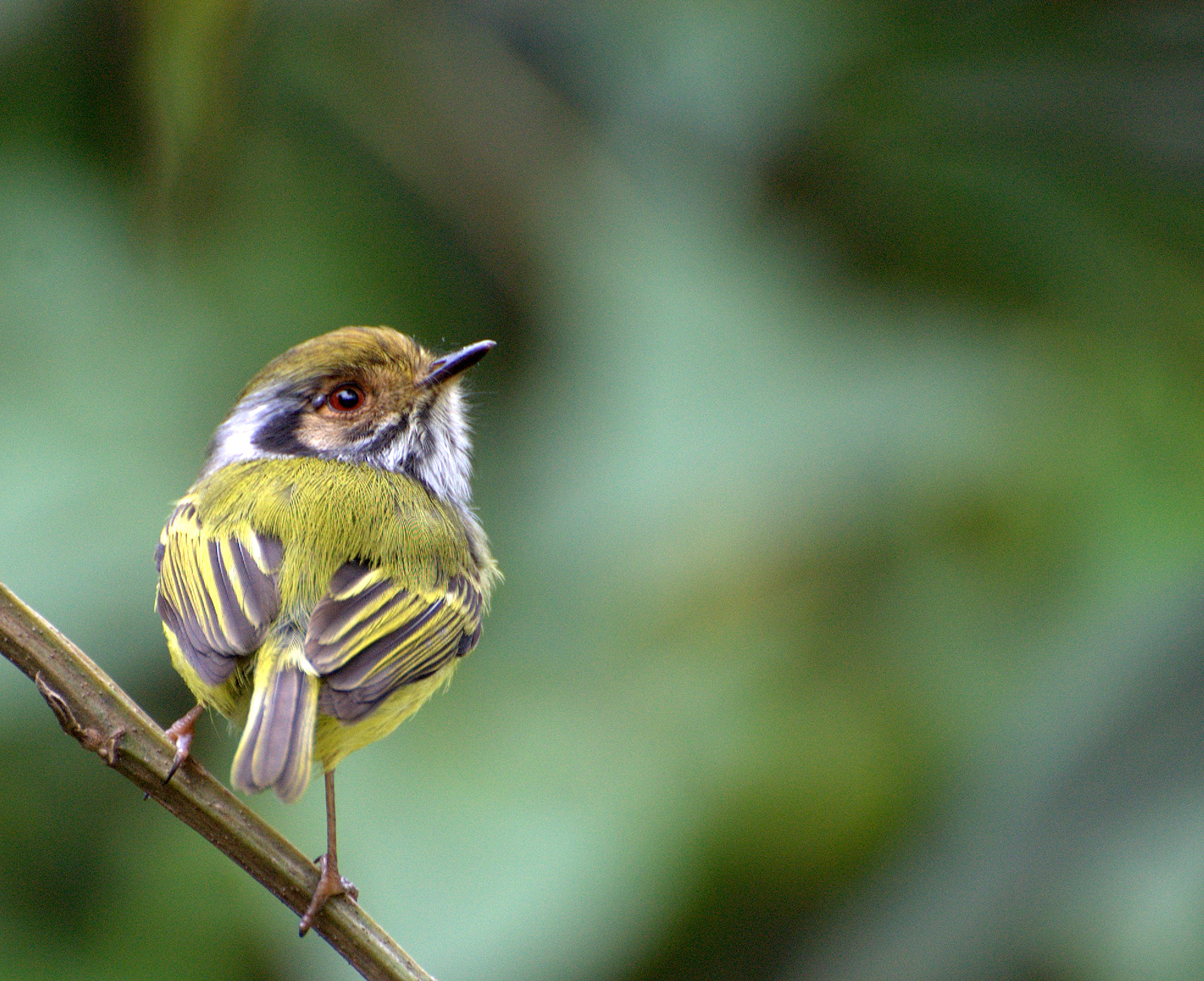 Eared Pygmy-tyrant (Myiornis auricularis) Horto Florestal de São Paulo